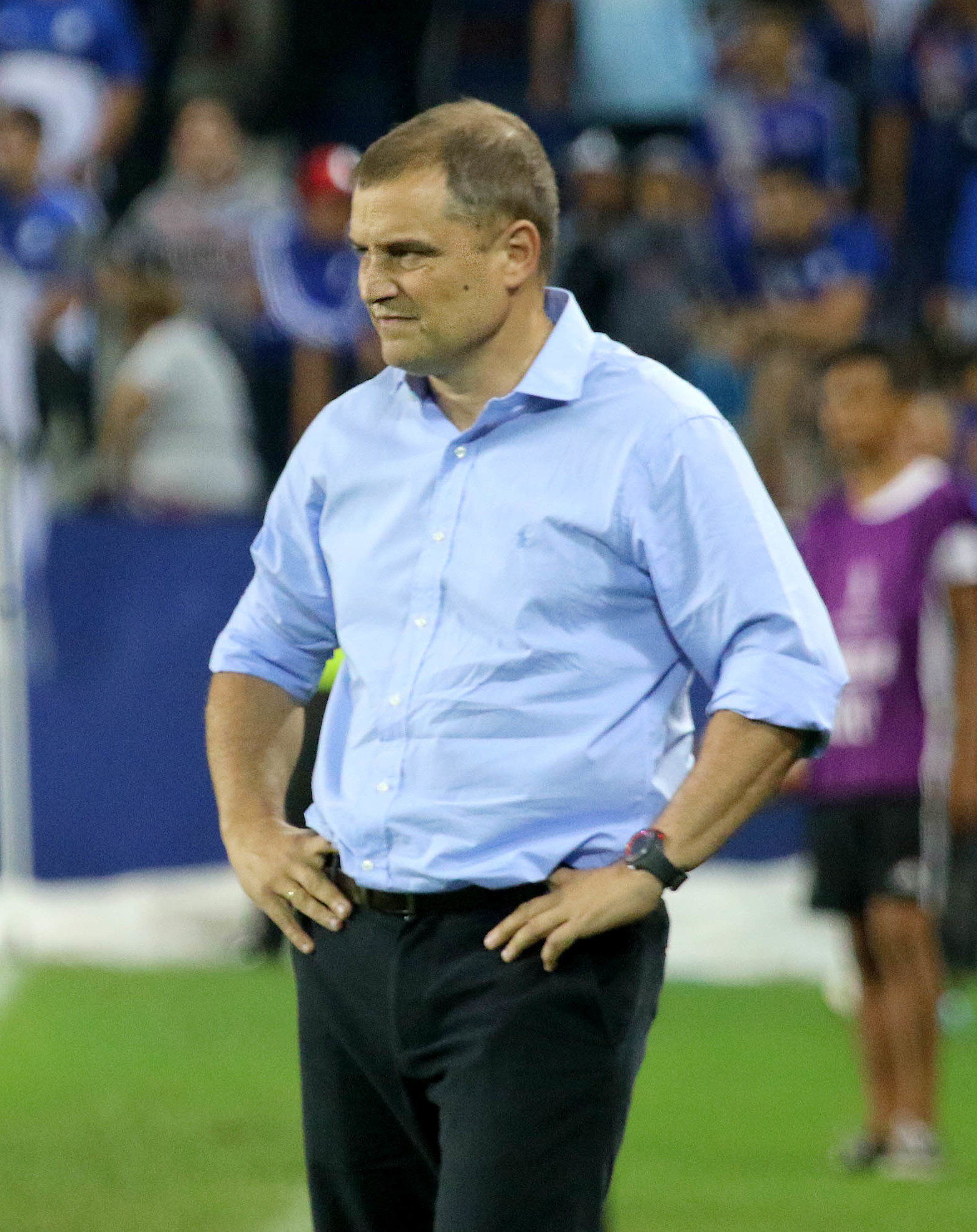 Guayaquil, jueves 06 de julio del 2017 (Andes).-Emelec enfrenta a San Lorenzo por los octavos de final de la Copa Libertadores, el partido se disputa en el estadio Capwell. En la gráfica Diego Aguirre, DT. de San Lorenzo Foto:Andes/César Muñoz